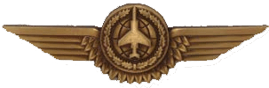 Tätigkeitsabzeichen für Kampfbeobachter (Waffensystemoffizier) der Bundeswehr Voraussetzungen: Stufe I, Bronze: Besitz des Militärluftfahrzeugbesatzungsscheins (MBS) und abgeschlossene Ausbildung zum Kampfbeobachter (Waffensystemoffizier) oder Luftfahrzeugoperationsoffizier. Stufe II, Silber: Wie Stufe I und 1200 Flugstunden. Stufe III, Gold: Wie Stufe I und 1800 Flugstunden. Anmerkung: Als Flugstunden angerechnet wird die gesamte Flugzeit als Luftfahrzeugbesatzungsangehörige einschließlich der Ausbildung. Ausführung: Stilisierter Globus mit Flugzeug im Eichenlaubkranz in Doppelschwinge mit unterem Federkranz, metallgeprägt; bronze-, silber- oder goldfarben.